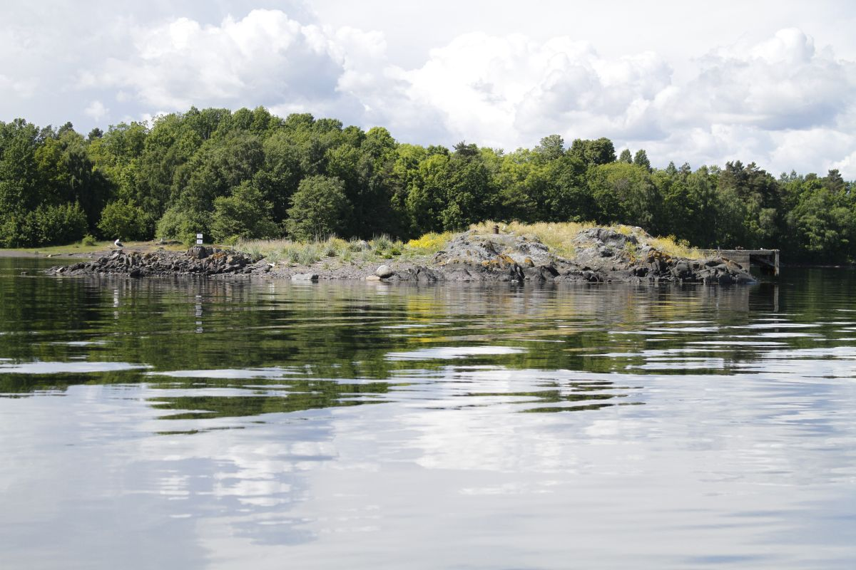 Bueskjær er en viktig hekkeplass for hettemåker og makrellterner.